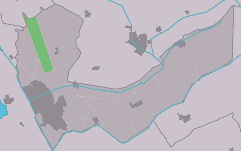 Kaartsje fan himrik fan Lúnbert